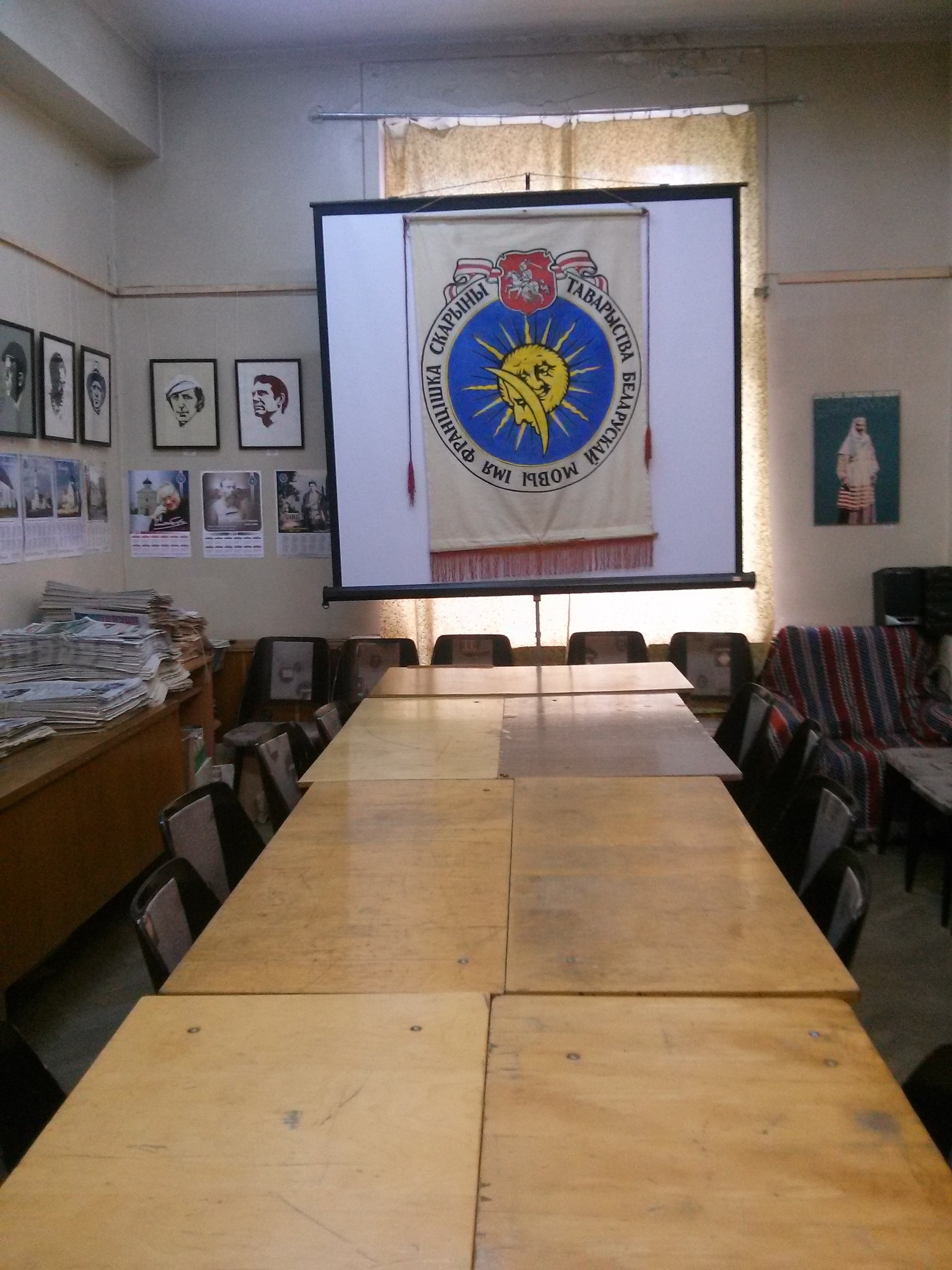 Канферэнц-зала сядзібы Таварыства беларускай мовы імя Францішка Скарыны.